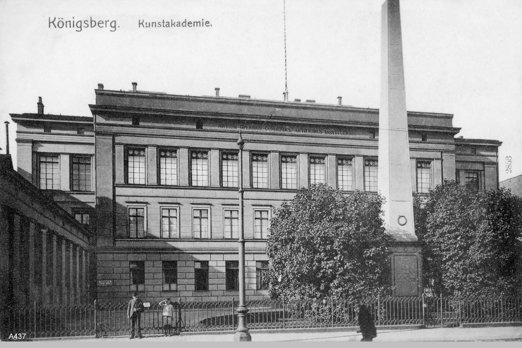 Königsberg